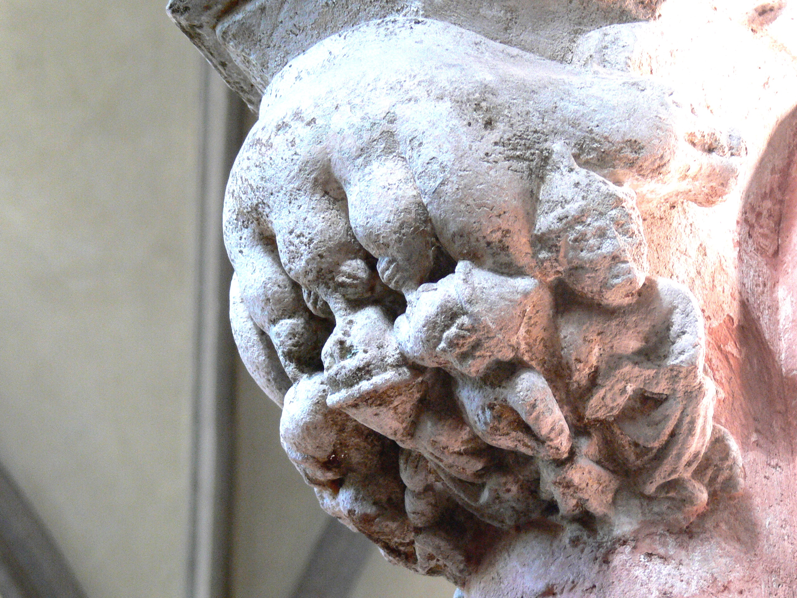 Münster in Heilsbronn. Mortuarium ( 1412-1433 ): Sog. "Judensau"-Kapitell - Antisemitische Darstellung von Juden, die an den Zitzen einer Sau saugen